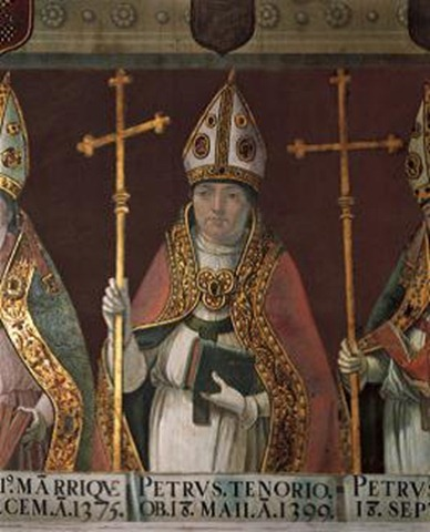 Retrato de don Pedro Tenorio, arzobispo de Toledo. Falleció en 1399. El retrato forma parte de la colección de retratos de los arzobispos de Toledo situada en la sala capitular de la catedral de Toledo.